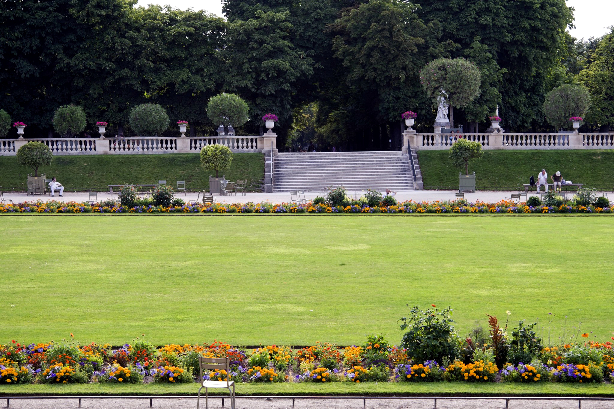 Terrasse du Fer à Cheval, Jardin du Luxembourg, VIe arrondissement, Paris, France.